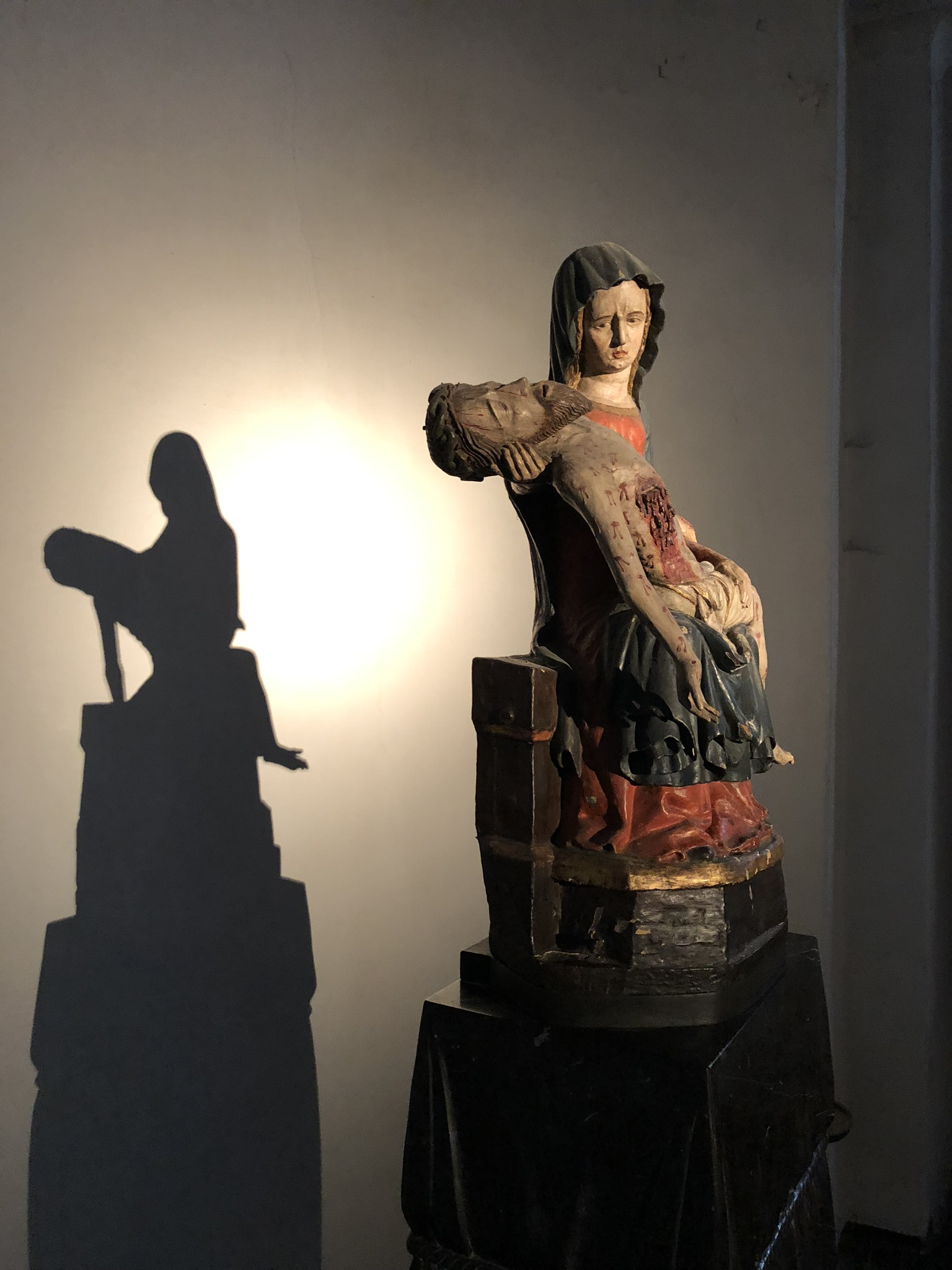 Pieta in der Kirche St. Pantaleon in Köln